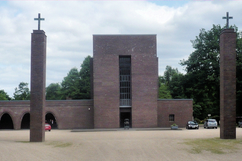 unter Denkmalschutz stehendes Gebäude des Süd-West-Friedhofs in Essen-Fulerum